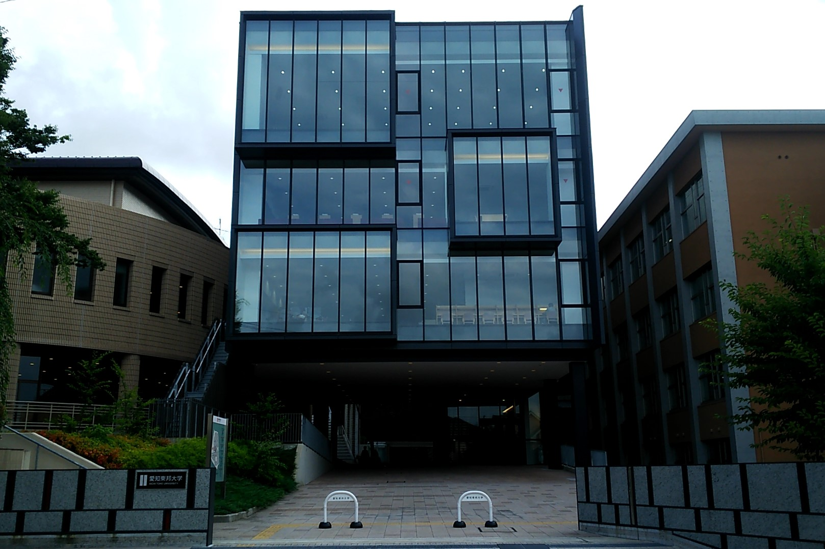 名古屋市名東区に本部を置く愛知東邦大学。2014年に完成したL棟。図書館やラーニングコモンズなどの機能を備える。